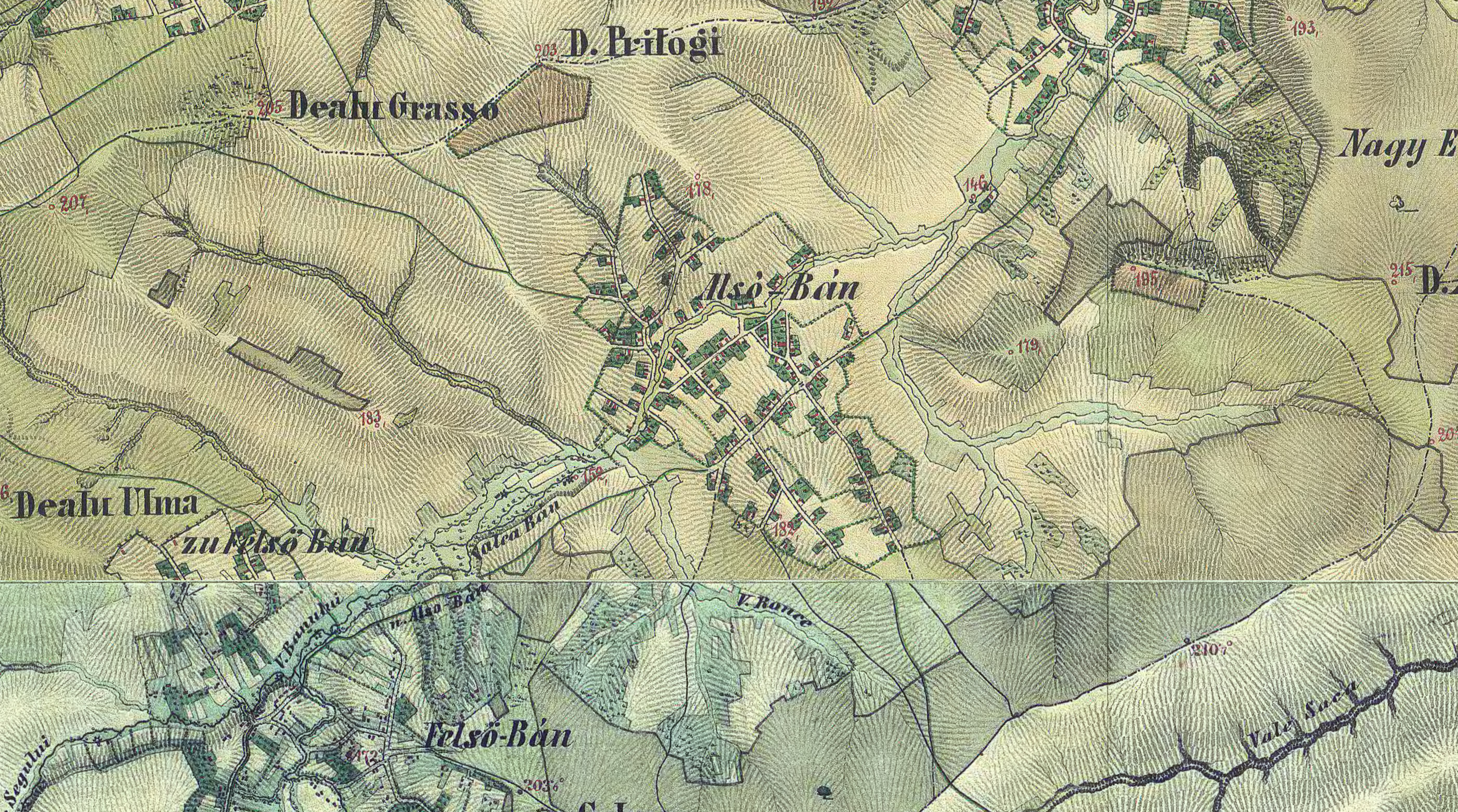 A doua ridicare topografică militară a Ungariei, 1868-1869, XLVIII:52-53, fragmentul cuprinde întreg hotarul satului Bănișor, Sălaj.